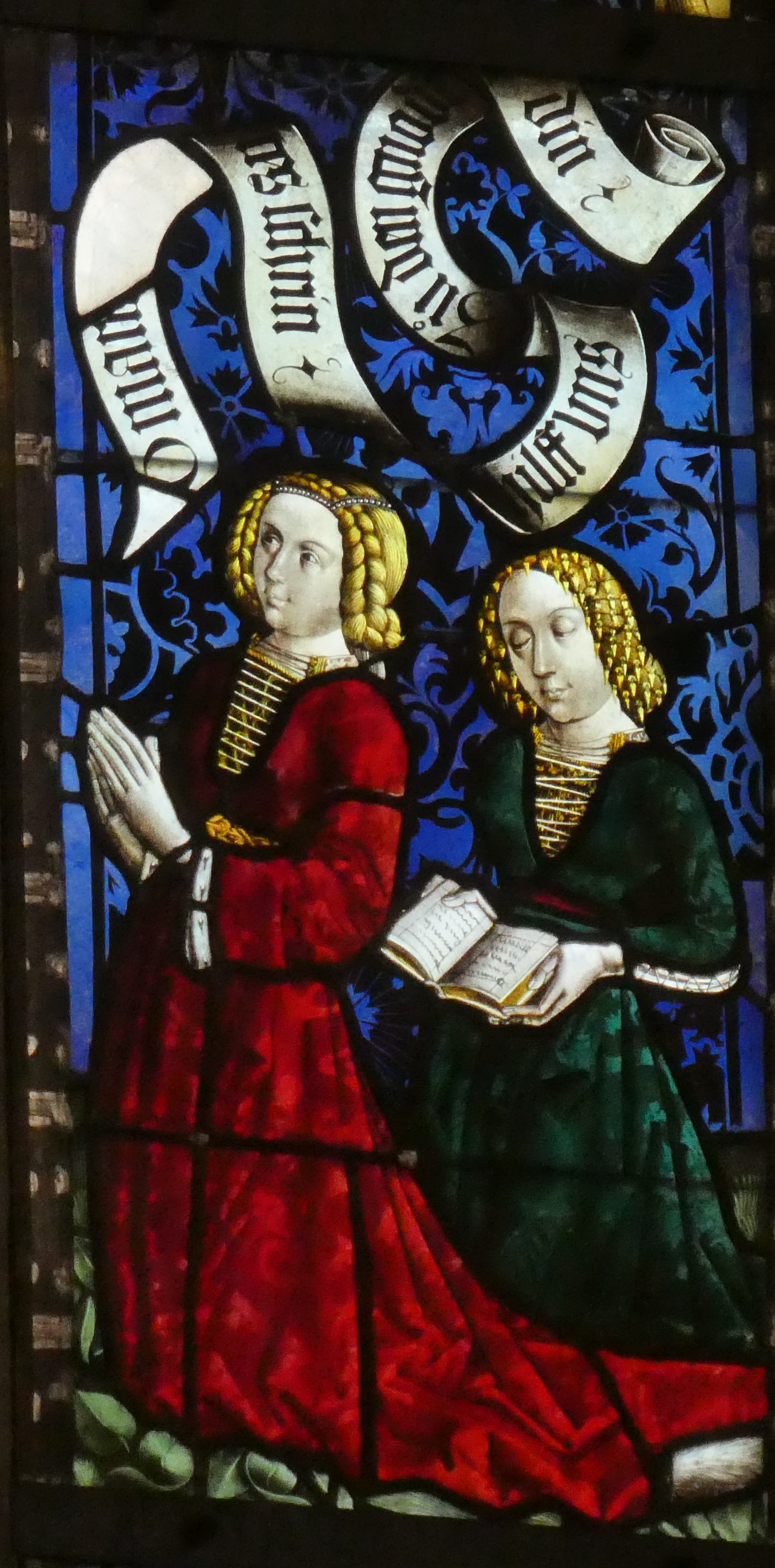 Glasfenster in der Tübinger Stiftskirche: Mechthild von der Pfalz mit ihrer Enkelin Margarethe Württemberger